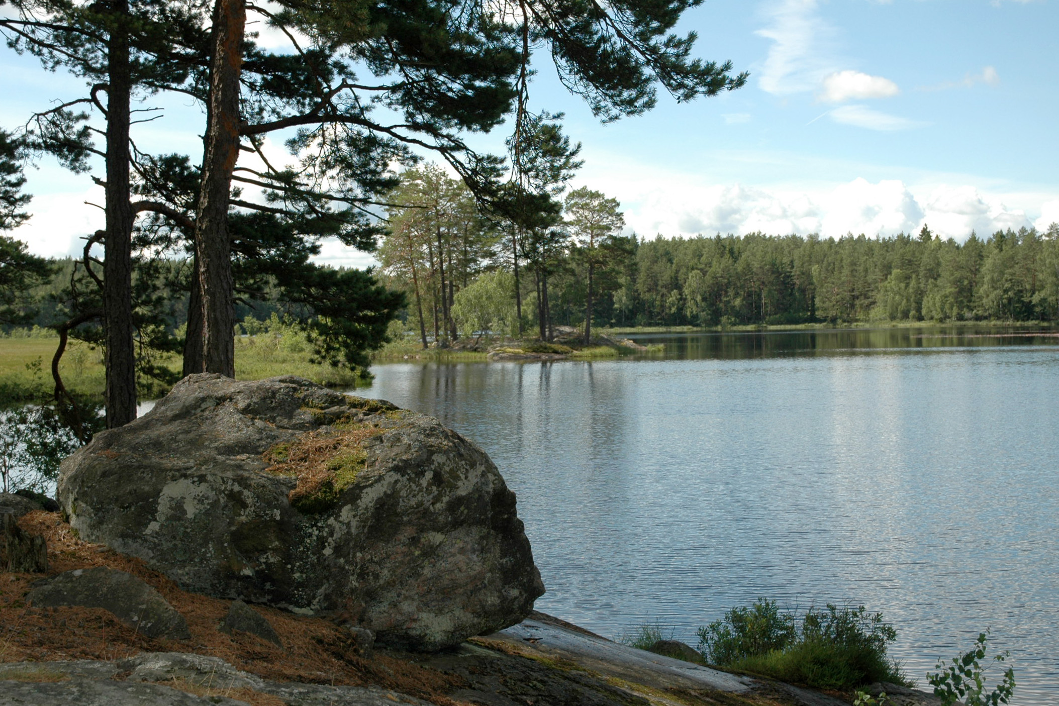 Sjön Pilthyttedammen i Nyköpings kommun.